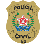 Brasão da Engenharia Civil do Estado de Minas Gerais